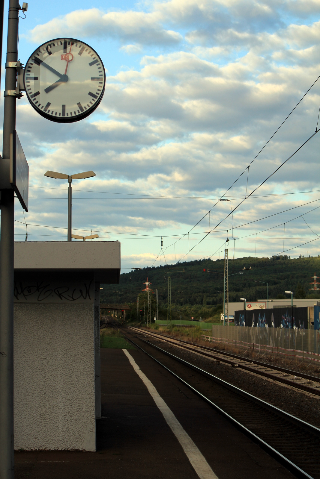 Am Bahnhof Schweich, 54338 Schweich, Germany